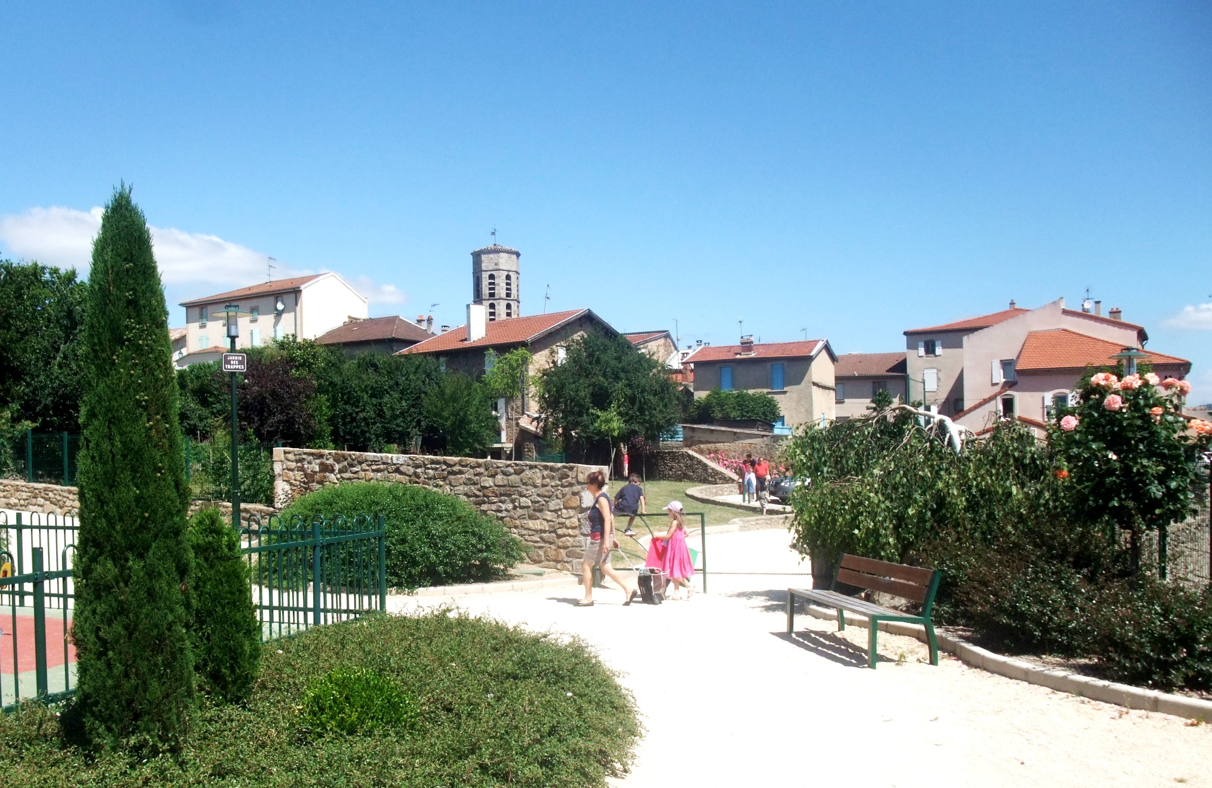 Roiffieux jardin des Trappes